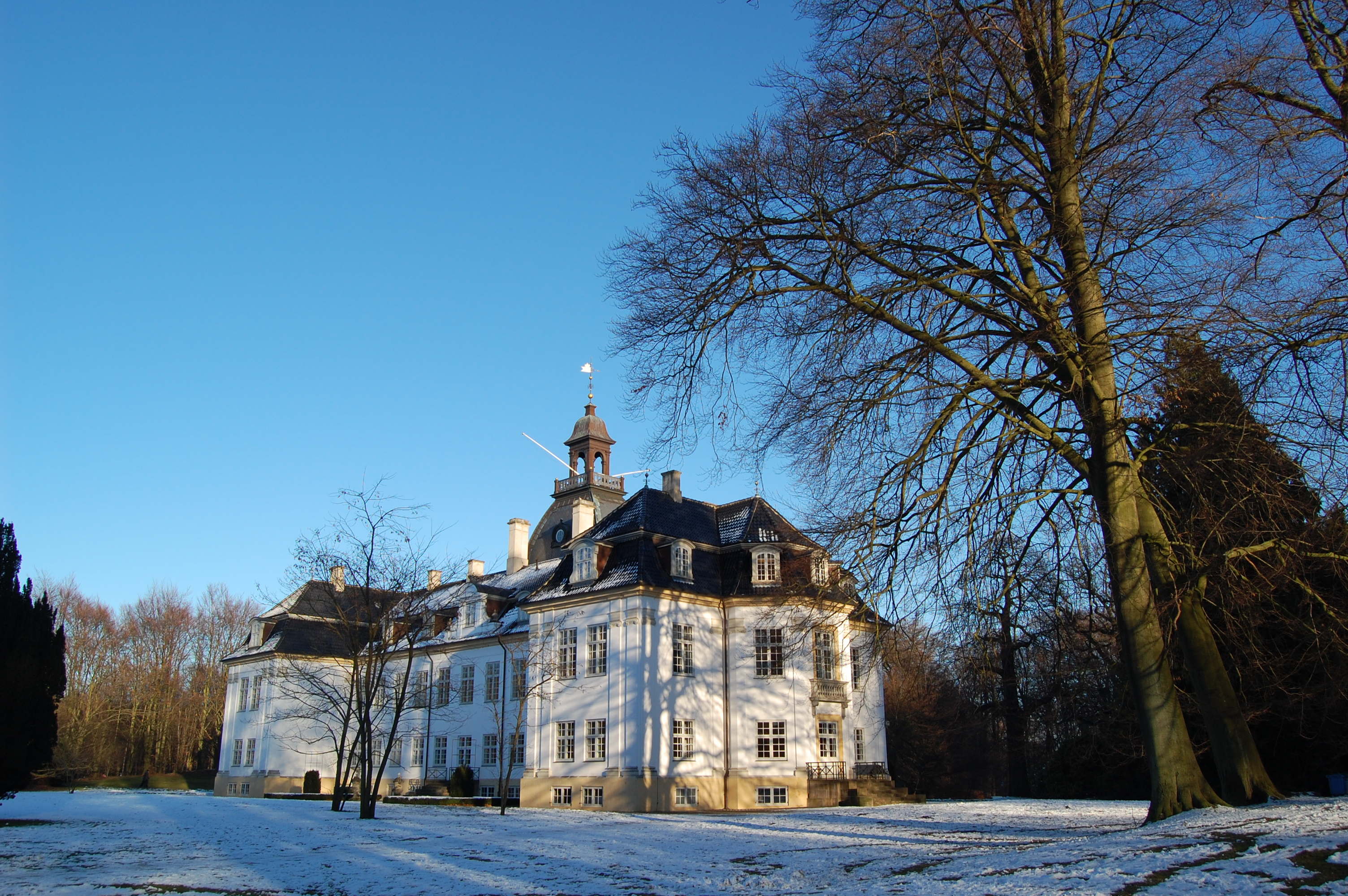 Charlottenlund Slot